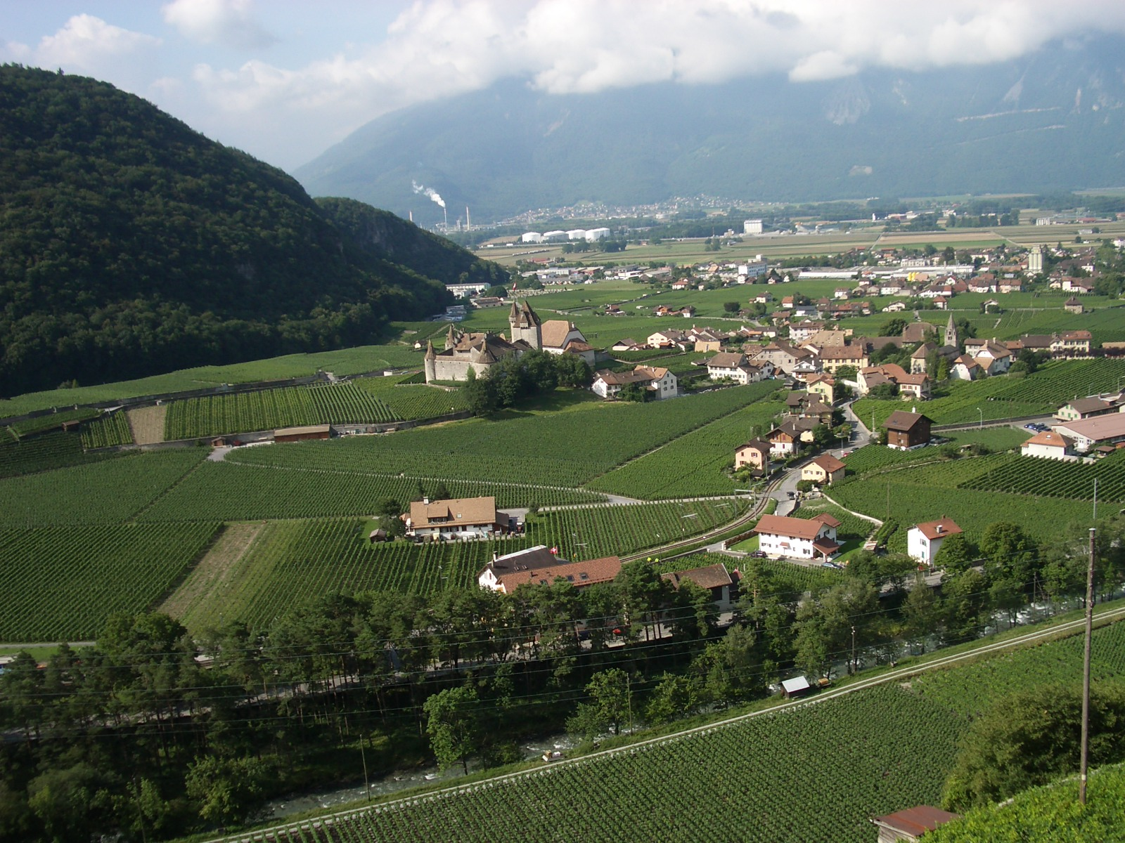 Aigle VD, Switzerland self-made, August 2006